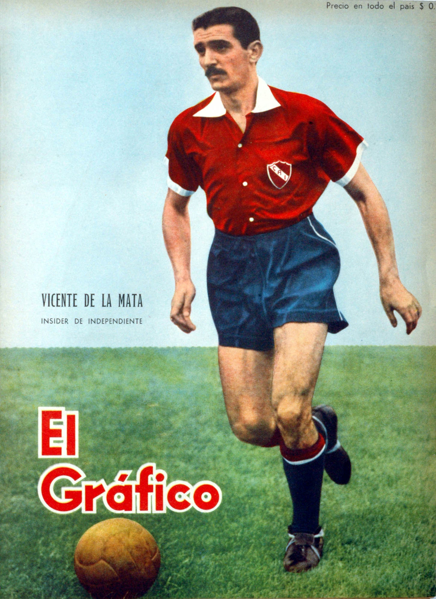 El Grafico del 09 de Noviembre de 1945. Edicion 1374